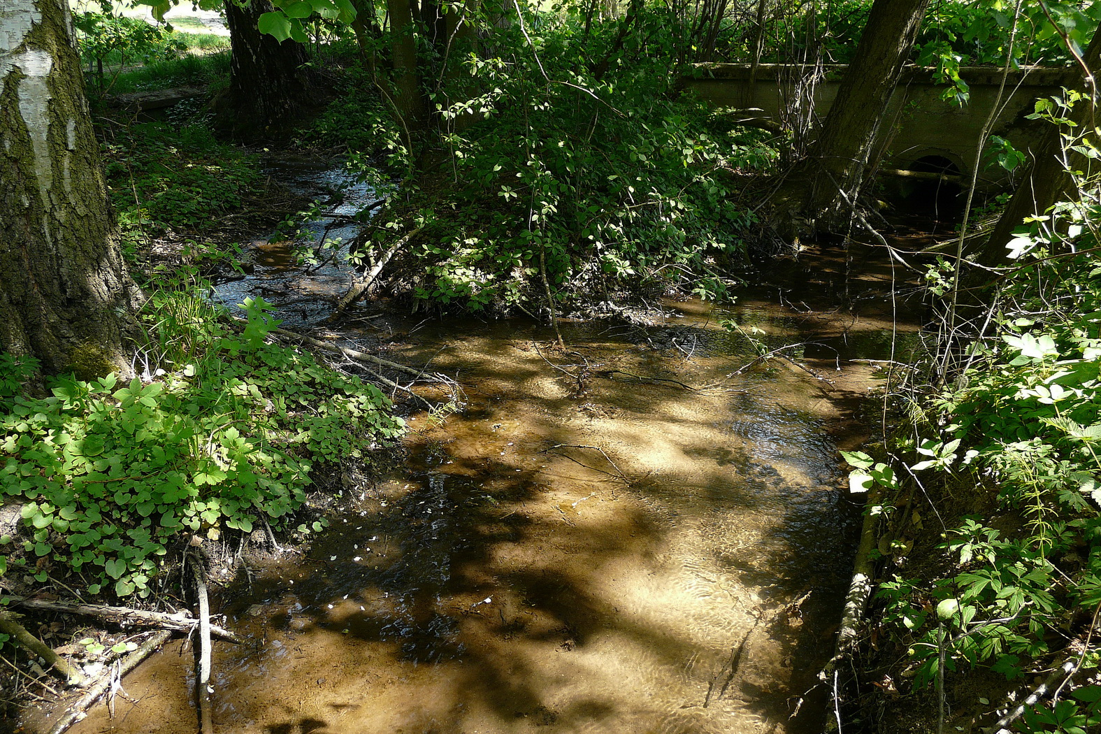 Soutok Křešovského s Pilským potokem